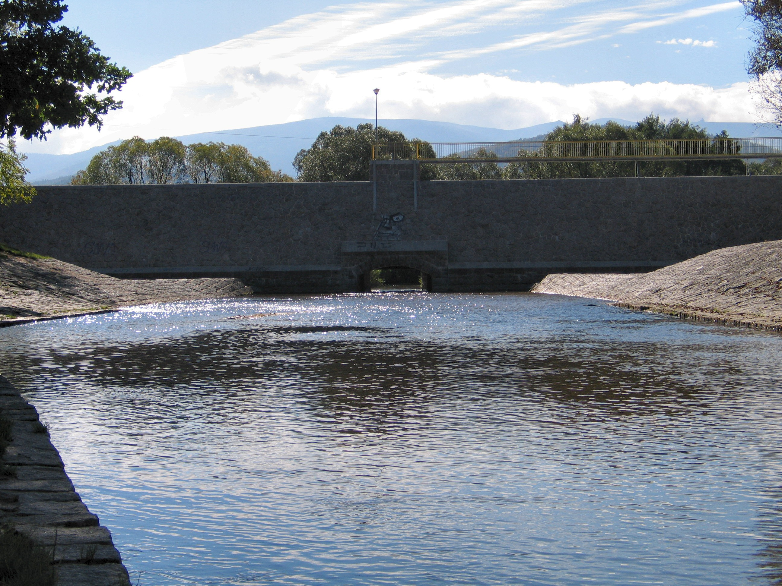 Wrzosówka river in Cieplice Spa.